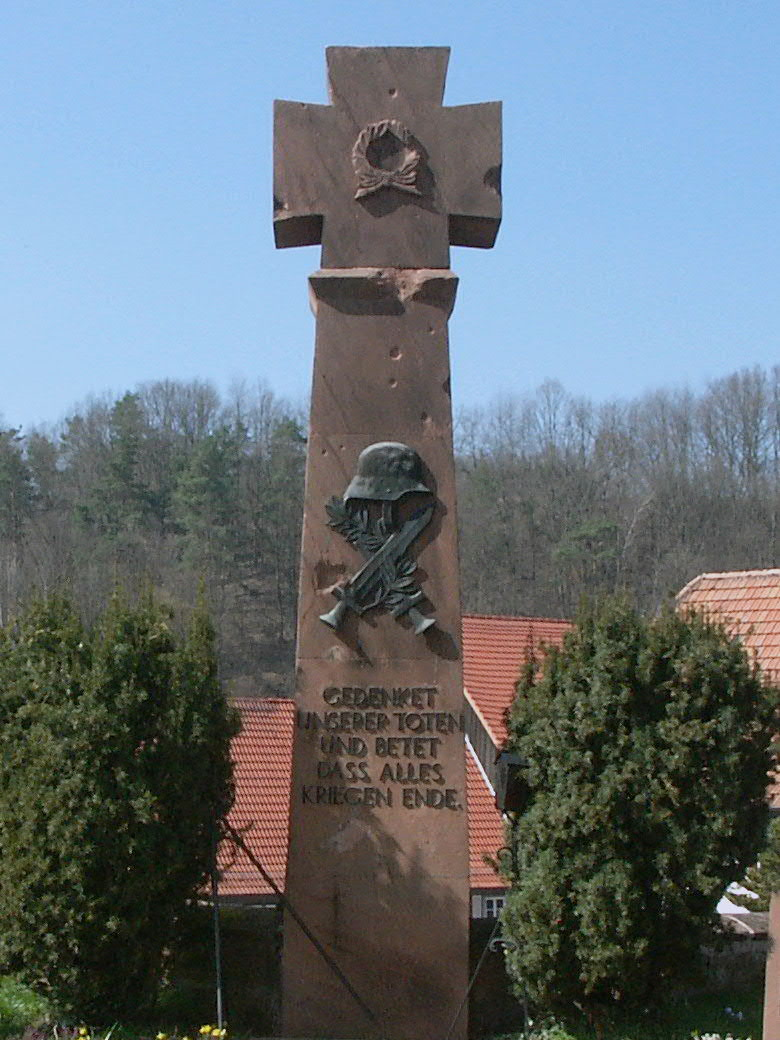 War Memorial - Krieger-/Kriegsopferdenkmal - Mémorial de guerre